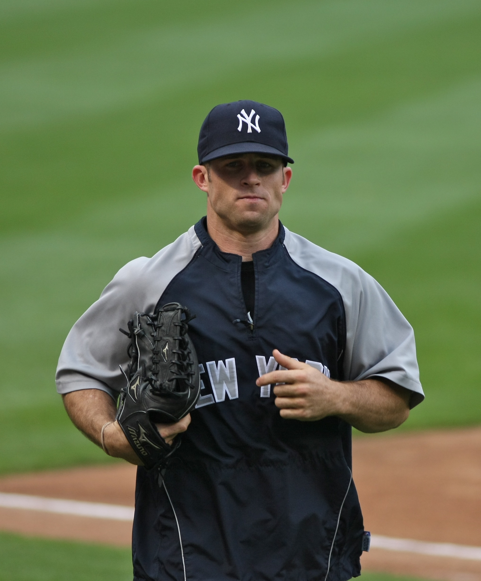 Brett Gardner